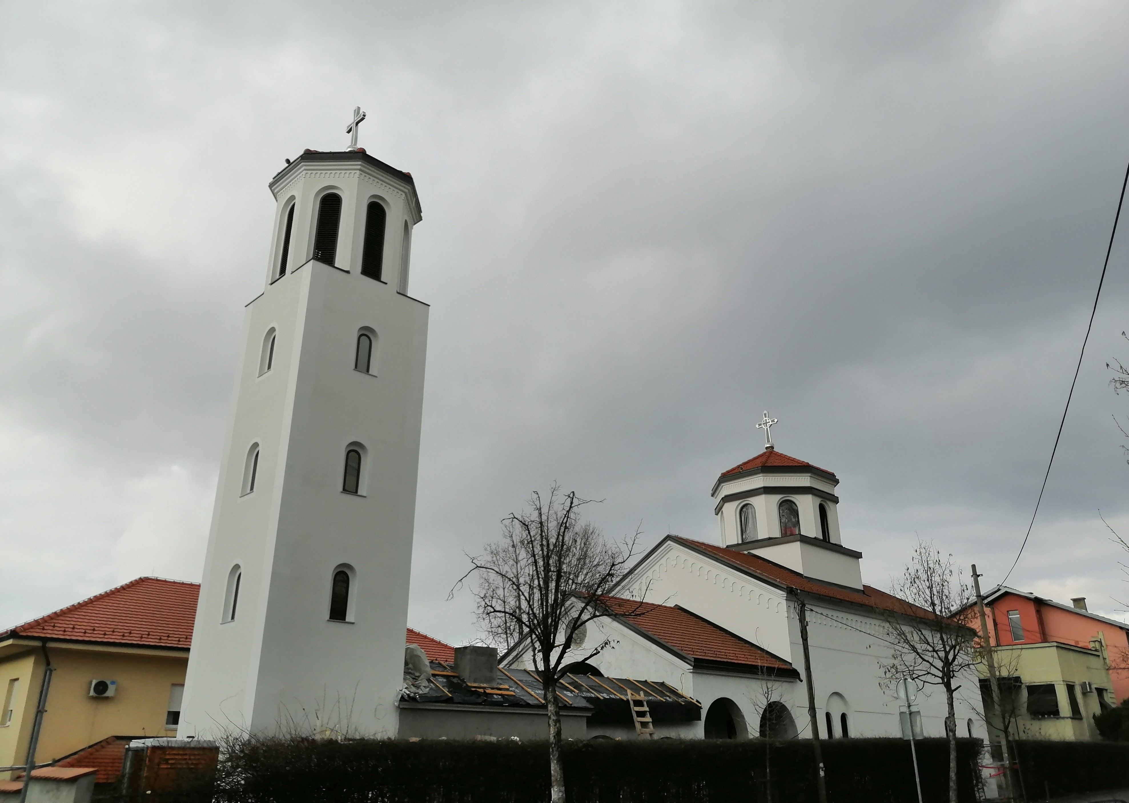 Srpski (latinica): Crkva Svete Trojice u Beogradu